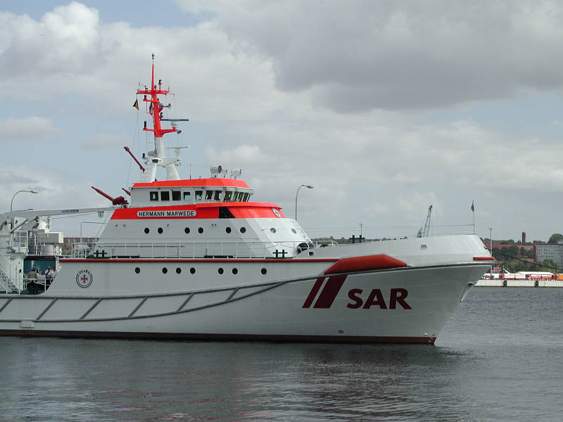 Seenotrettungskreuzer Hermann Marwede Außenansicht, selbst fotografiert